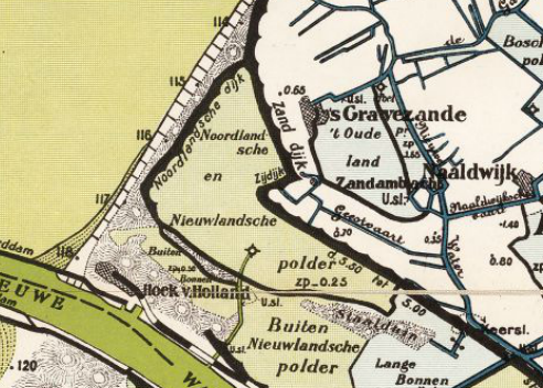 Nieuwland_en_Noordland polders